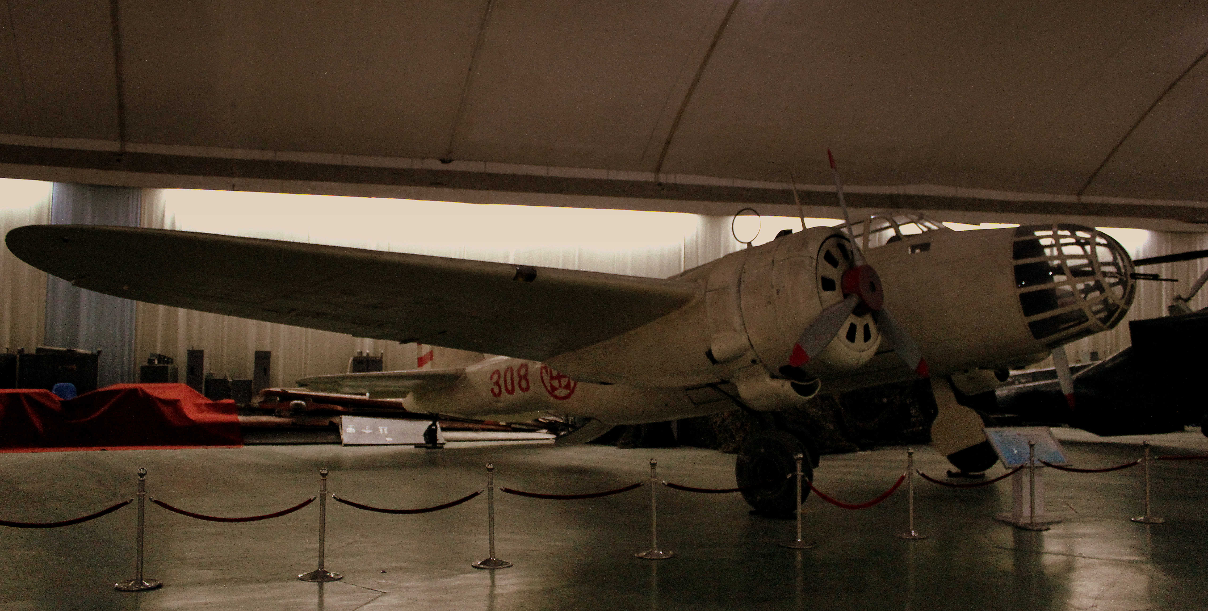 CHINA AVIATION MUSEUM AT DATANSHAN CHINA OCT 2012 Kawasaki Ki-48 bomber